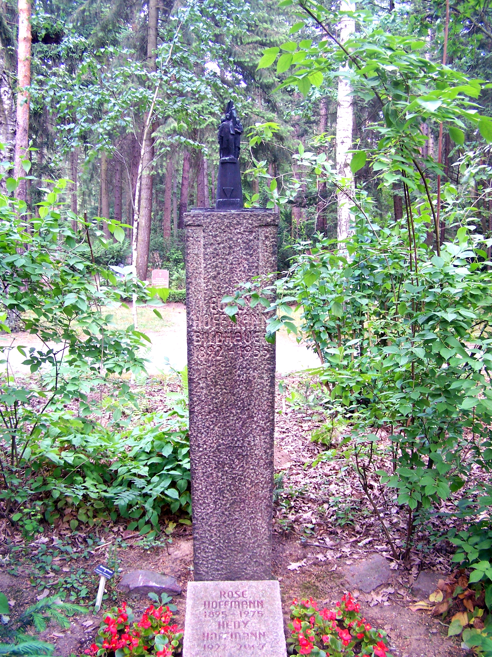 Grab des Bildhauers Eugen Hoffmann auf dem Heidefriedhof in Dresden